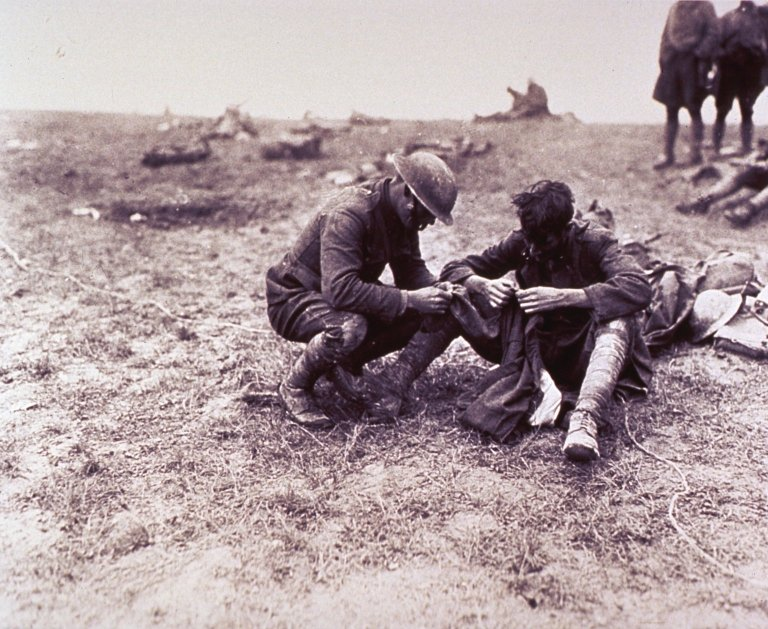 Close-up of two soldiers in uniform sitting on the ground examining an article of clothing for the presence of lice.